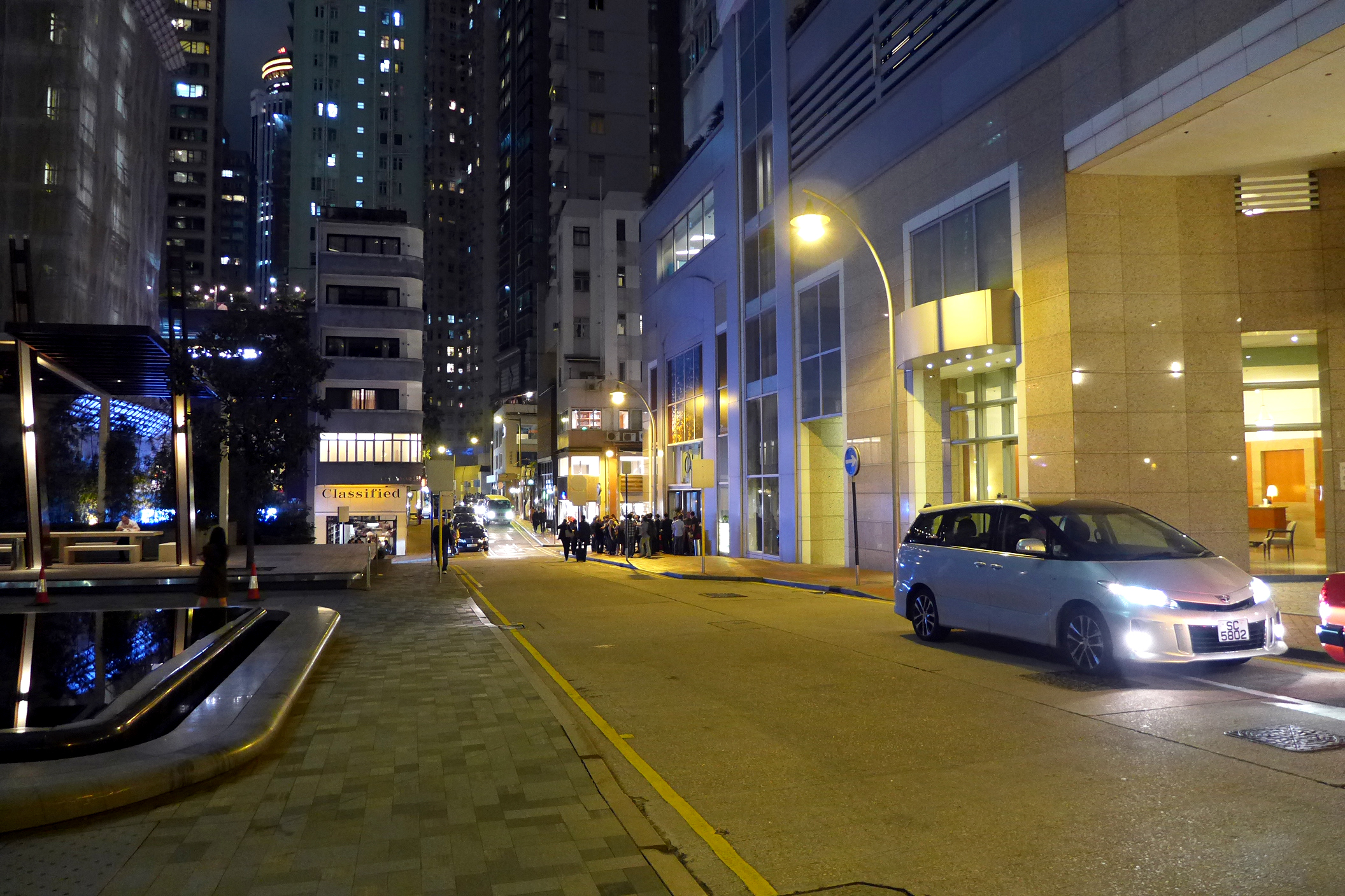 Star Street Night view